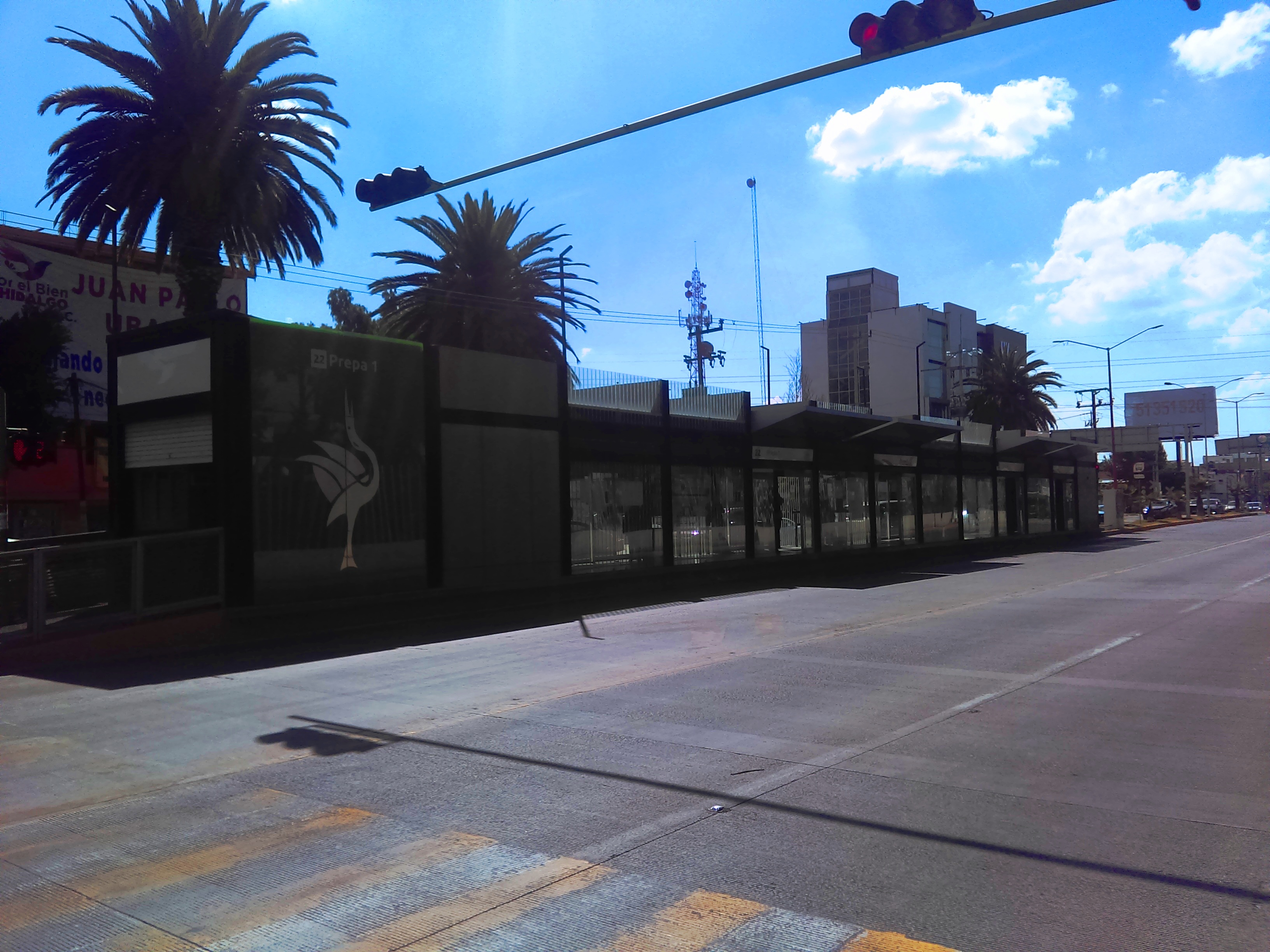 Estación del Tuzobús Prepa 1